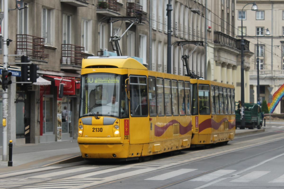 Tramwaj 105N2k/2000 o numerze 2130 na ul. Nowowiejskiej w Warszawie. This photo was taken during Railway Wikiexpedition 2014 set up by Wikimedia Polska Association in cooperation with Fundacja Grupy PKP. You can see all photographs in category Wikiekspedycja kolejowa 2014.